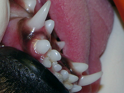 Doppelte Zahnreihe bei einem Hund